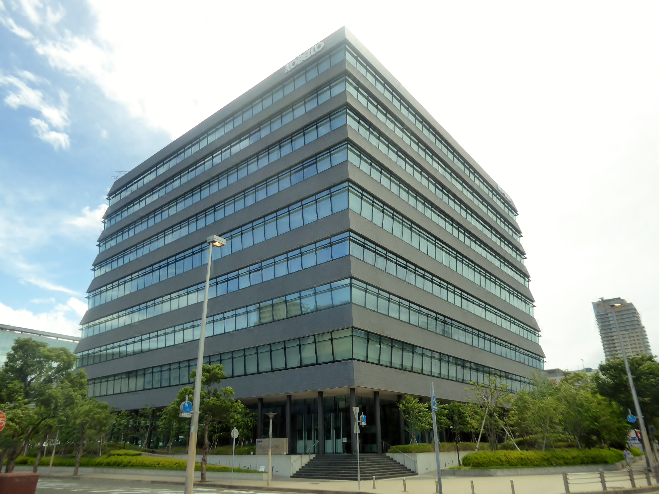 株式会社神戸製鋼所神戸本社を撮影。